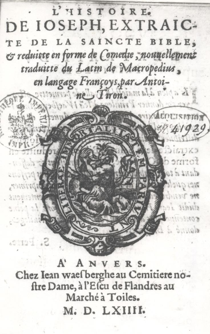 Title page of a French translation of Macropedius' Josephus by Antoine Tiron, printed by Jan van Waesberghen, Antwerp 1564. Courtesy of the Bibliotheque Nationale, Paris.